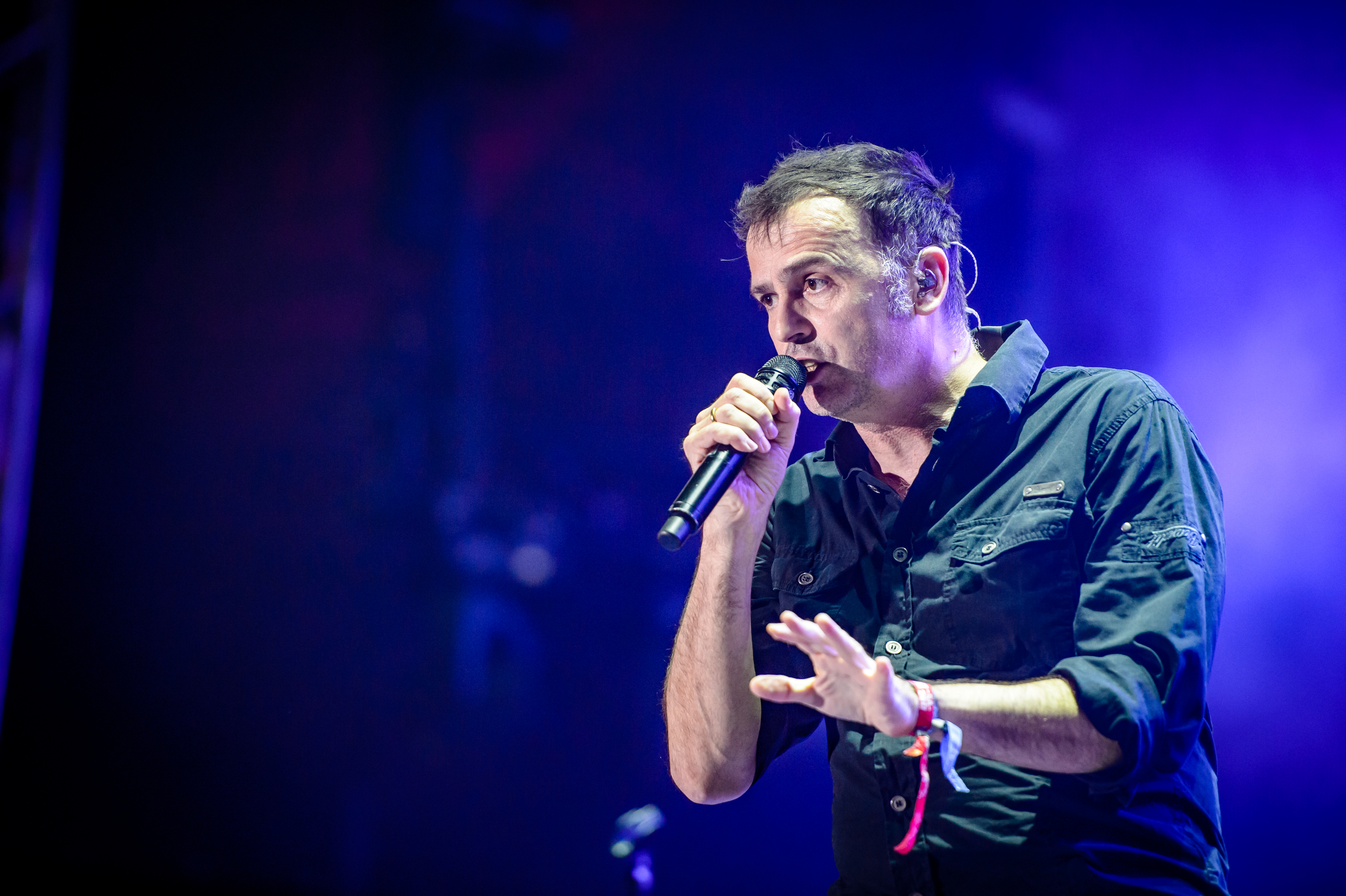 'RockHarz Open Air 2017; Ballenstedt': 'Blind Guardian'